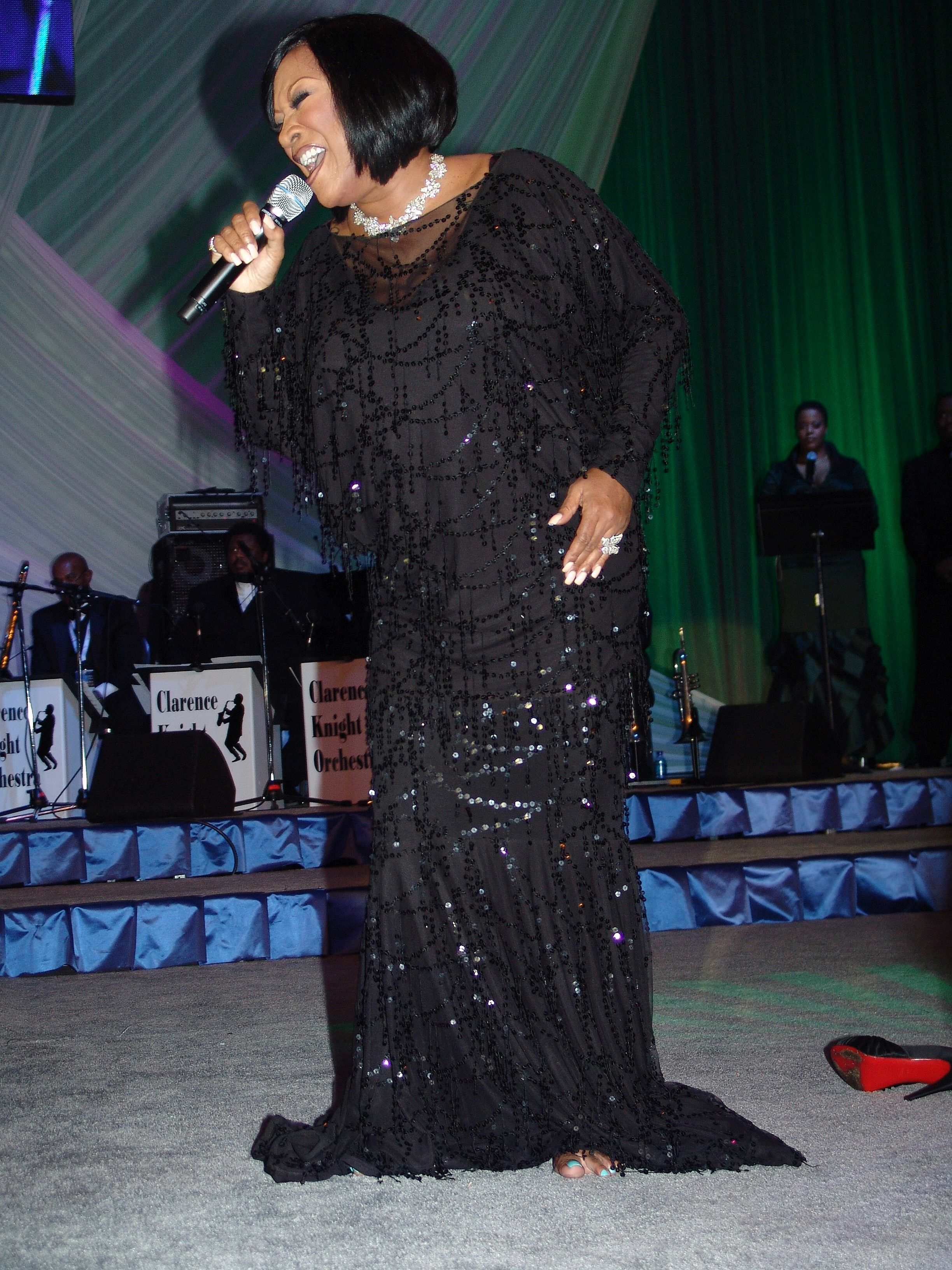 Patti Labelle performs 9 27 08 OBAMA event